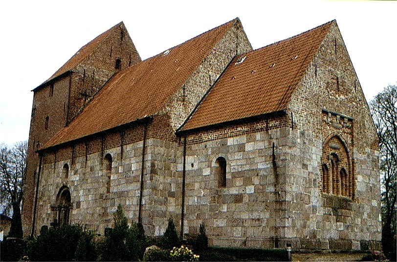 Munkbrarup Kirke i Sydslesvig. Munkbrarup kirke